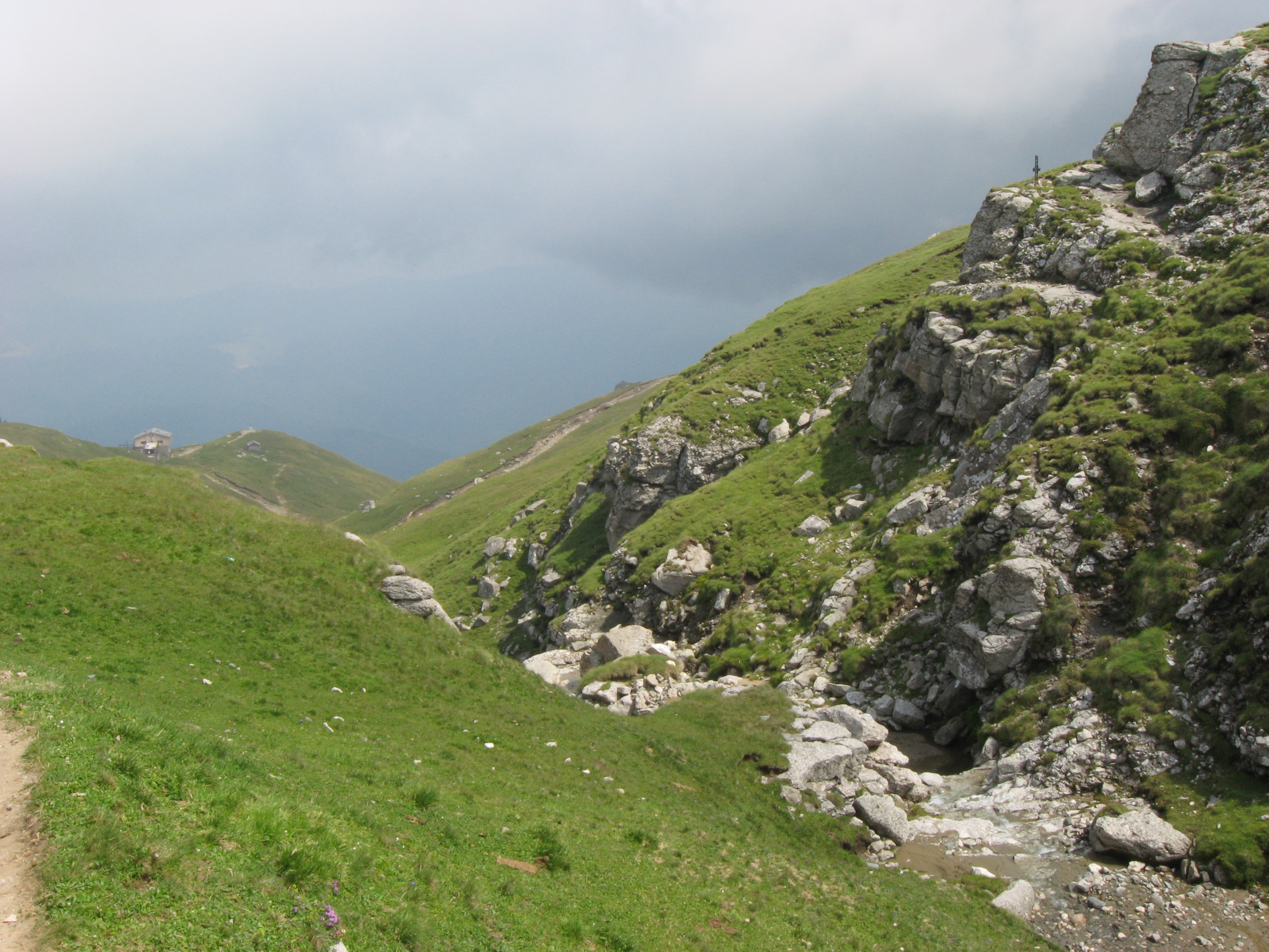 Bucegi